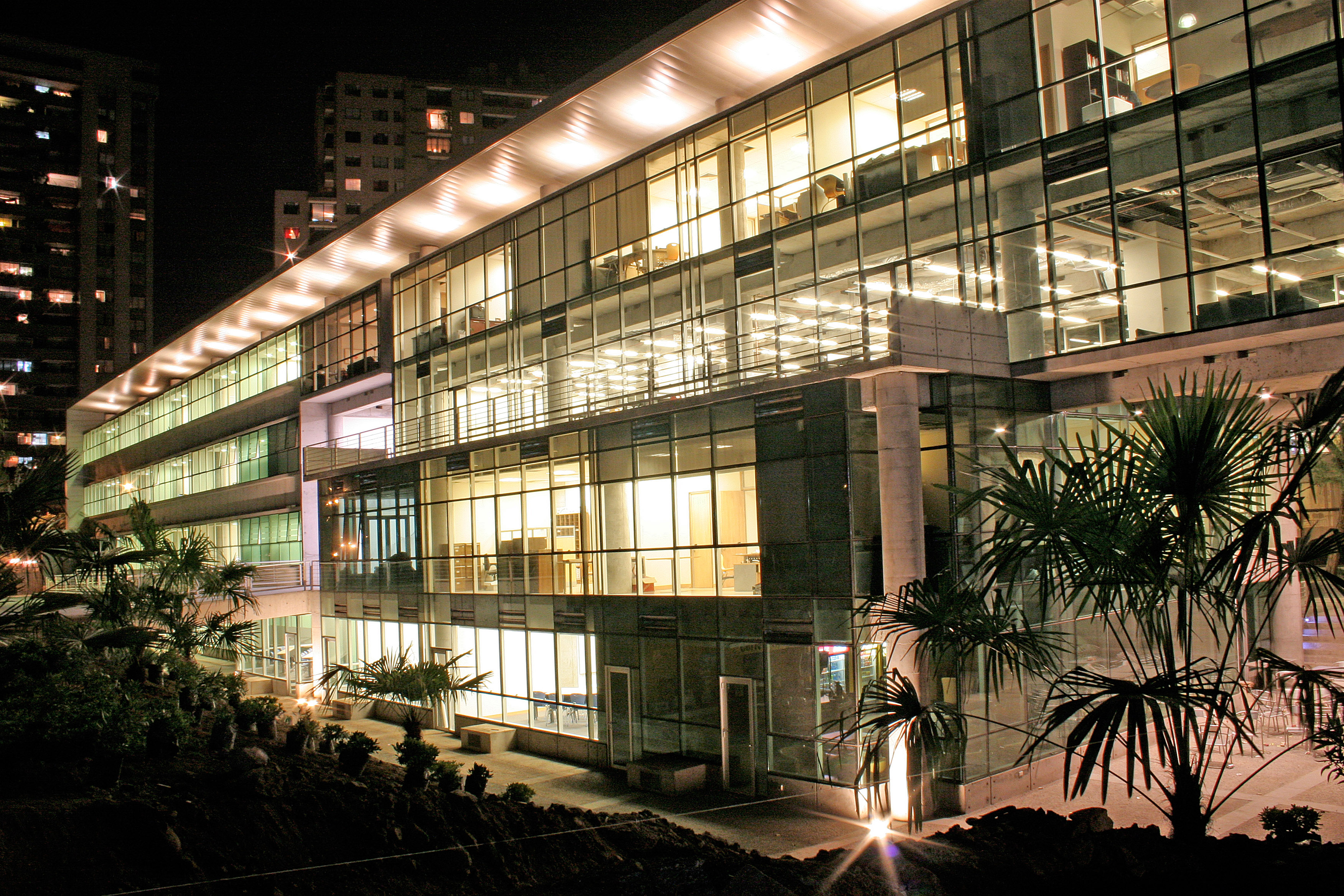 Edificio Tecnoaulas de la Facultad de Economía y Negocios de la Universidad de Chile en la noche